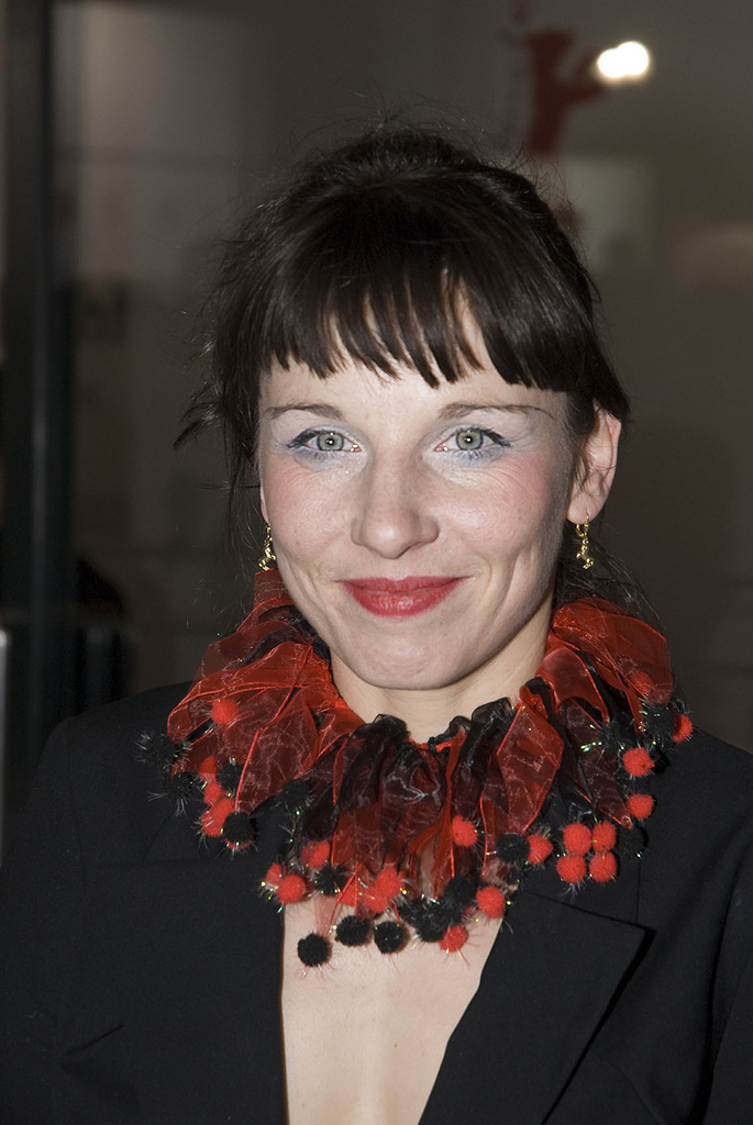 Meret Becker, German actress Volkswagen People’s Night 2008